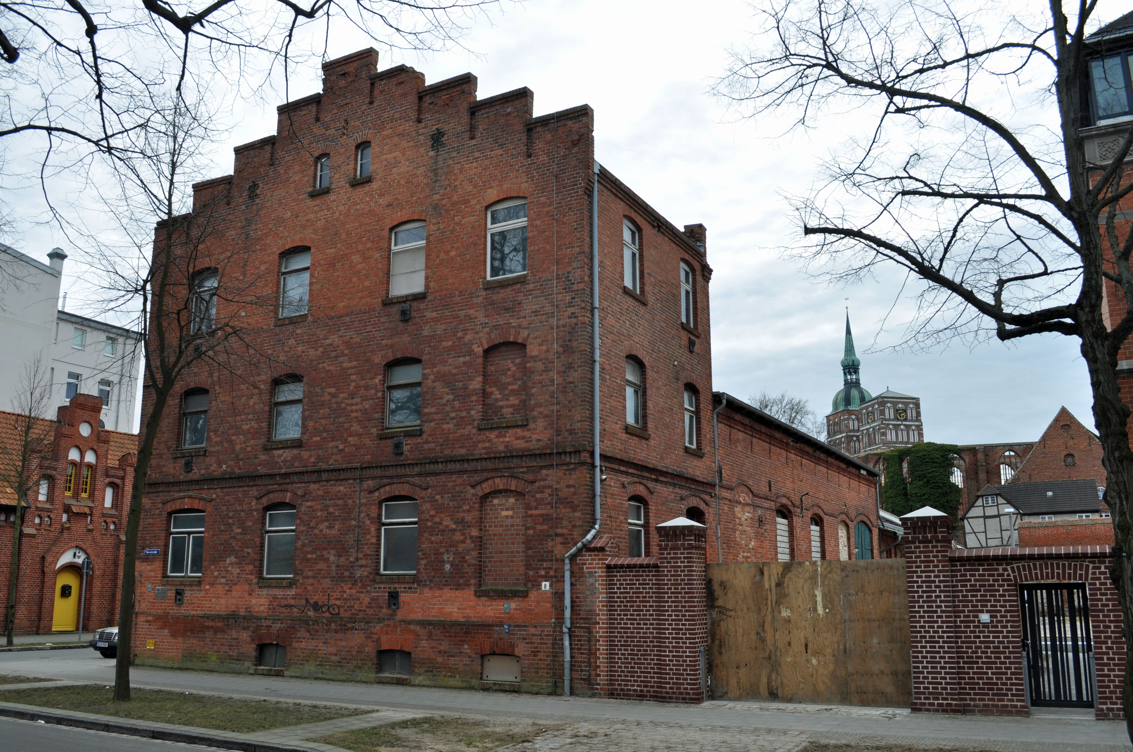 Gebäude bzw. Gebäudedetail in Stralsund. Straße und Hausnummer siehe Dateiname.